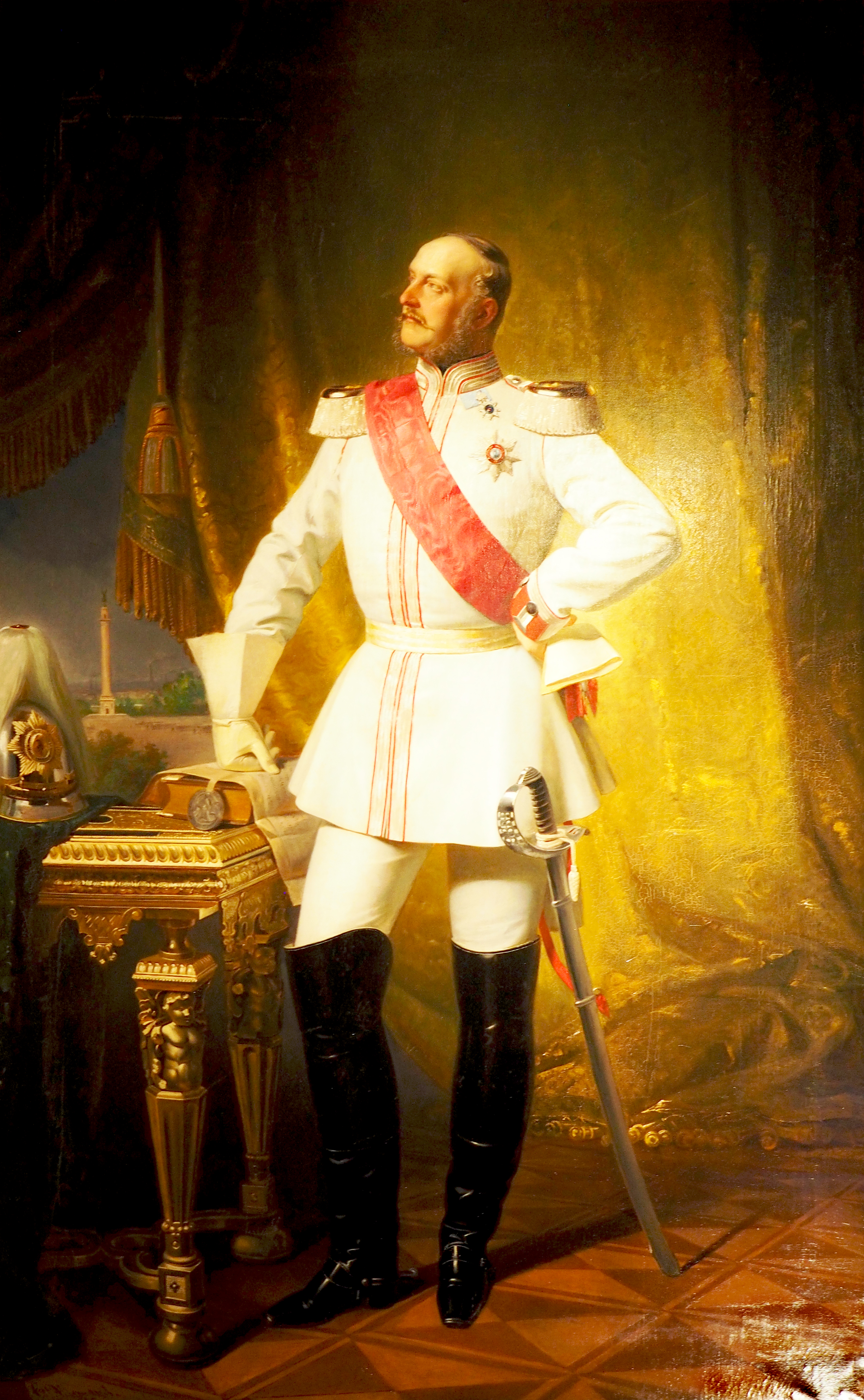 Georg V. (1819-1878), König von Hannover